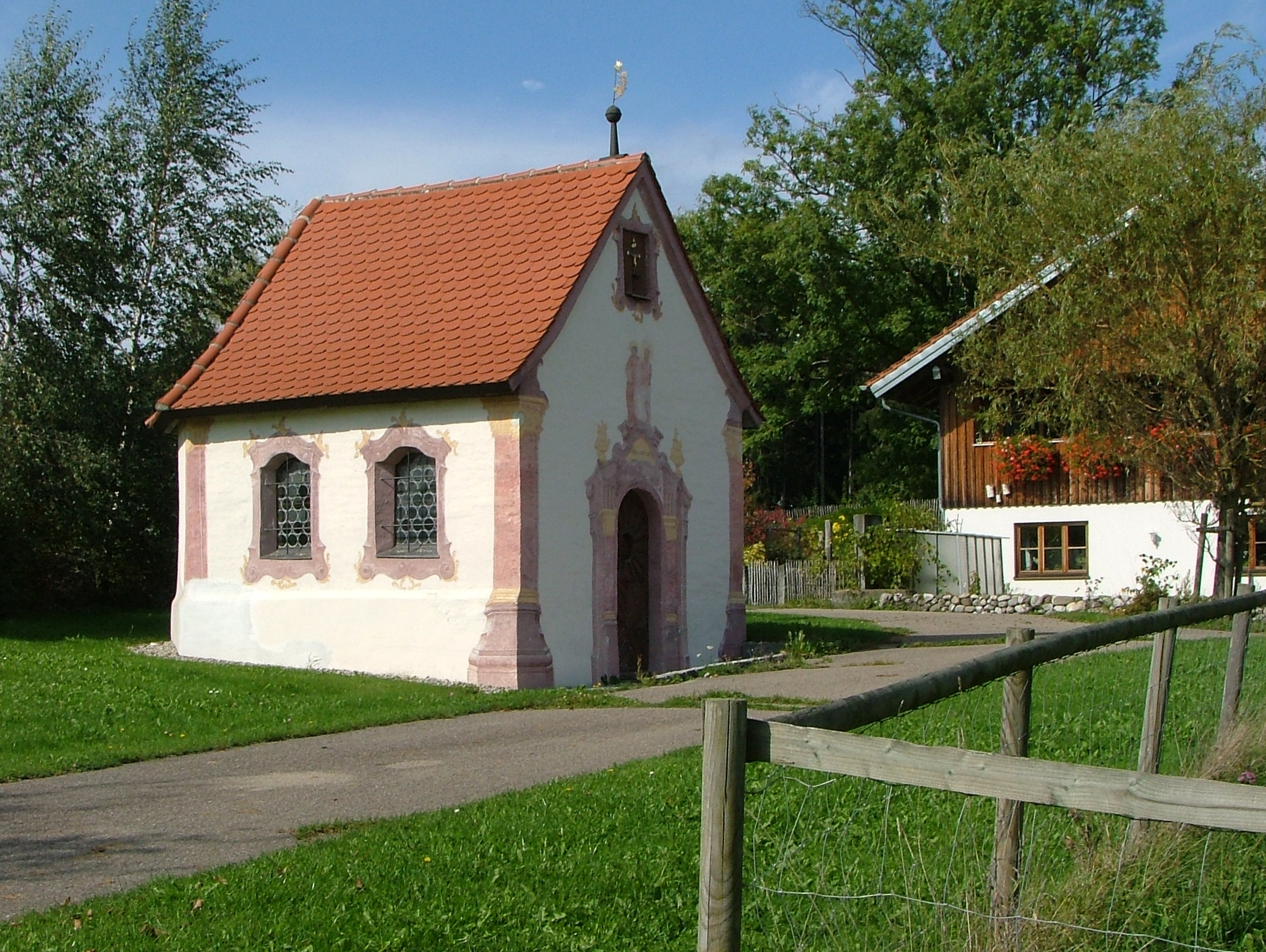 Kapelle